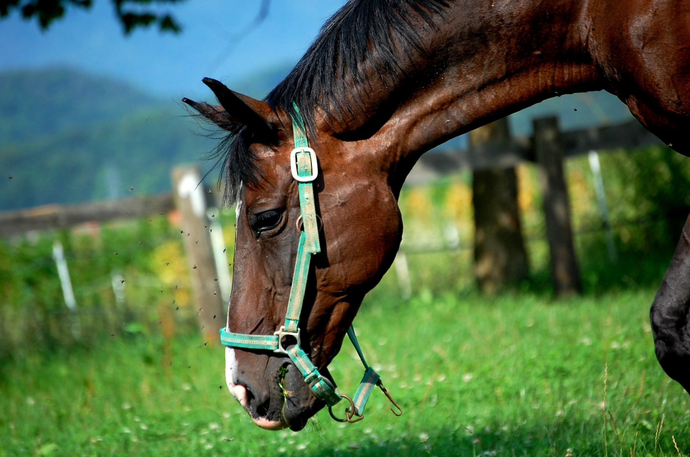 Fotografija je moja stvaritev.